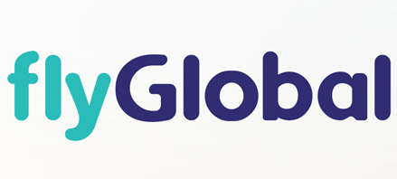 scan dan edit logo flyGlobal